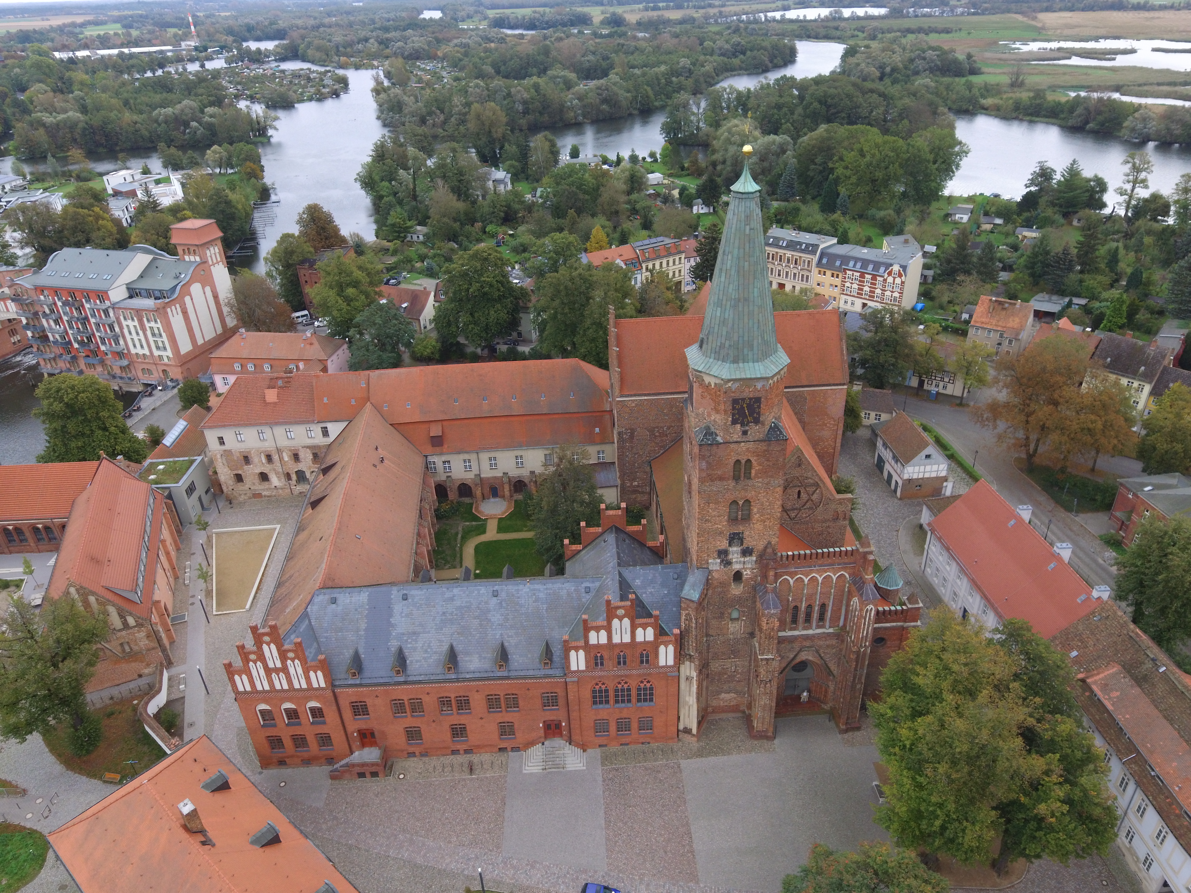 Luftbild des Doms zu Brandenburg